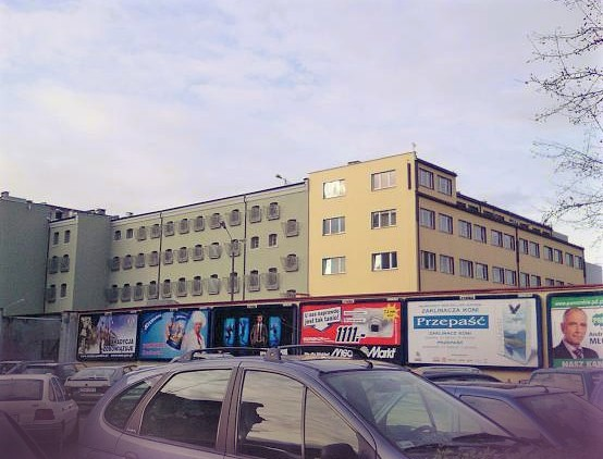 AŚ Gdańsk ("Kurkowa")/ "Kurkowa" Jail at Gdańsk